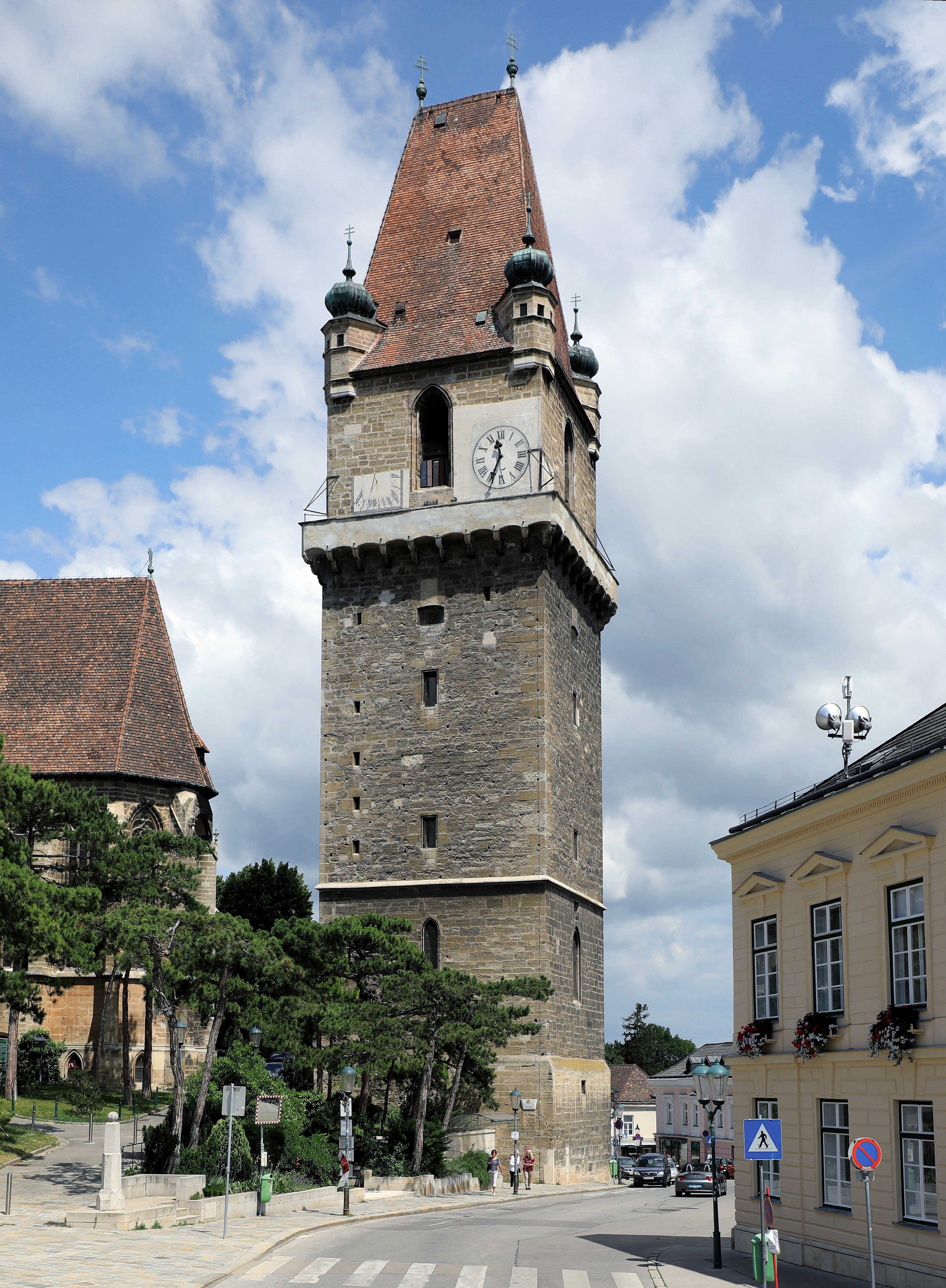 Der Wehrturm und markantes Wahrzeichen der niederösterreichischen Marktgemeinde Perchtoldsdorf. Links davon der Chor der Pfarrkirche hl. Augustinus und rechts das Gemeindeamt, ein ehemaliger späthistoristischer Meierhof aus dem Jahr 1838. Der Wehrturm wurde von 1450 bis 1521 errichtet. Er war ursprünglich ein Teil der ehemaligen Burgbefestigung und ostseitig in der Wehrmauer integriert.